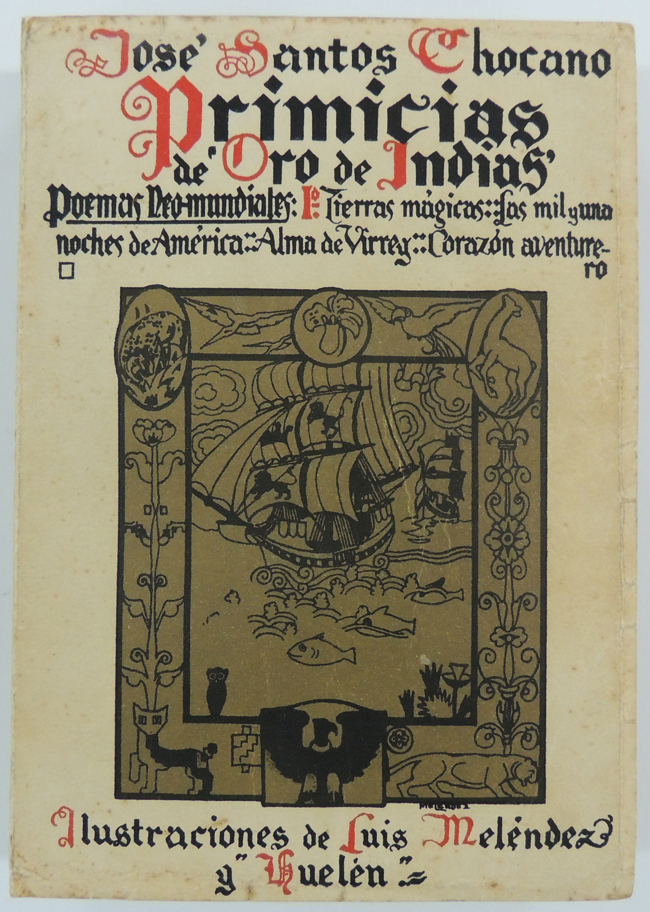 Primicias